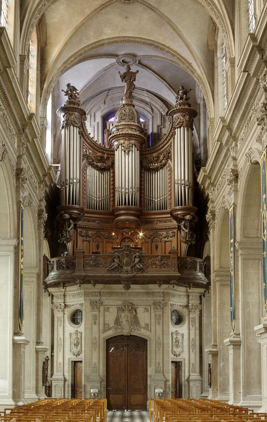 Cambrai (Nord, France), cathédrale Notre-Dame-de-Grâce, splendide buffet d'orgue de style Louis XV réalisé par Aimé-Joseph CARLIER en 1897, installé par le lillois BUISINE, sur un dessin de l'architecte diocésain GUIDASCI, pour l'orgue construit par Pierre SCHYVEN d'Ixelles, reconstruit en 1936 à cause des dommages de la première guerre mondiale par Auguste Convers, et restauré en 1996 par Bernard COGEZ.